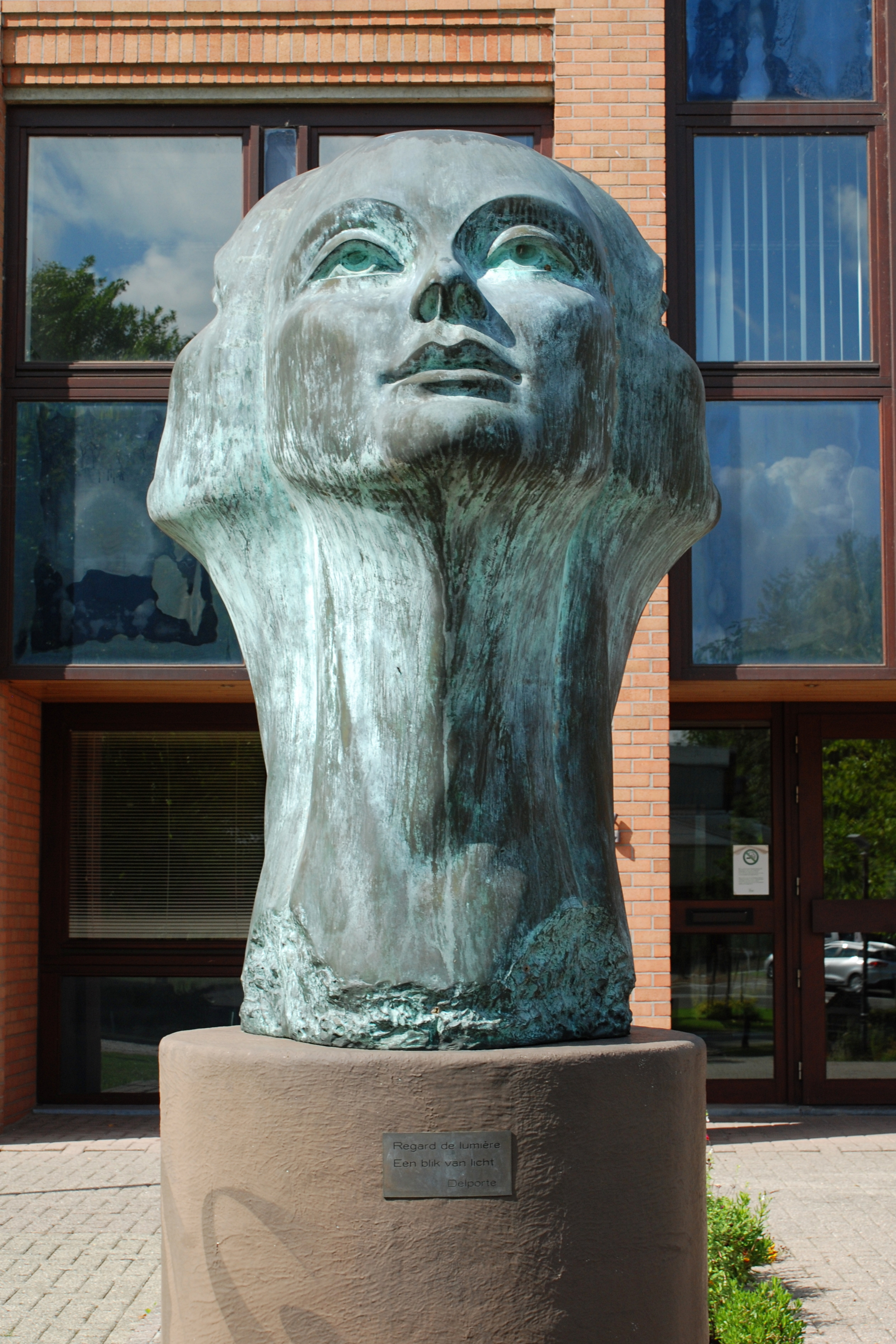 Belgique - Louvain-la-Neuve - Avenue Albert Einstein 4 - Regard de Lumière (Charles Delporte)